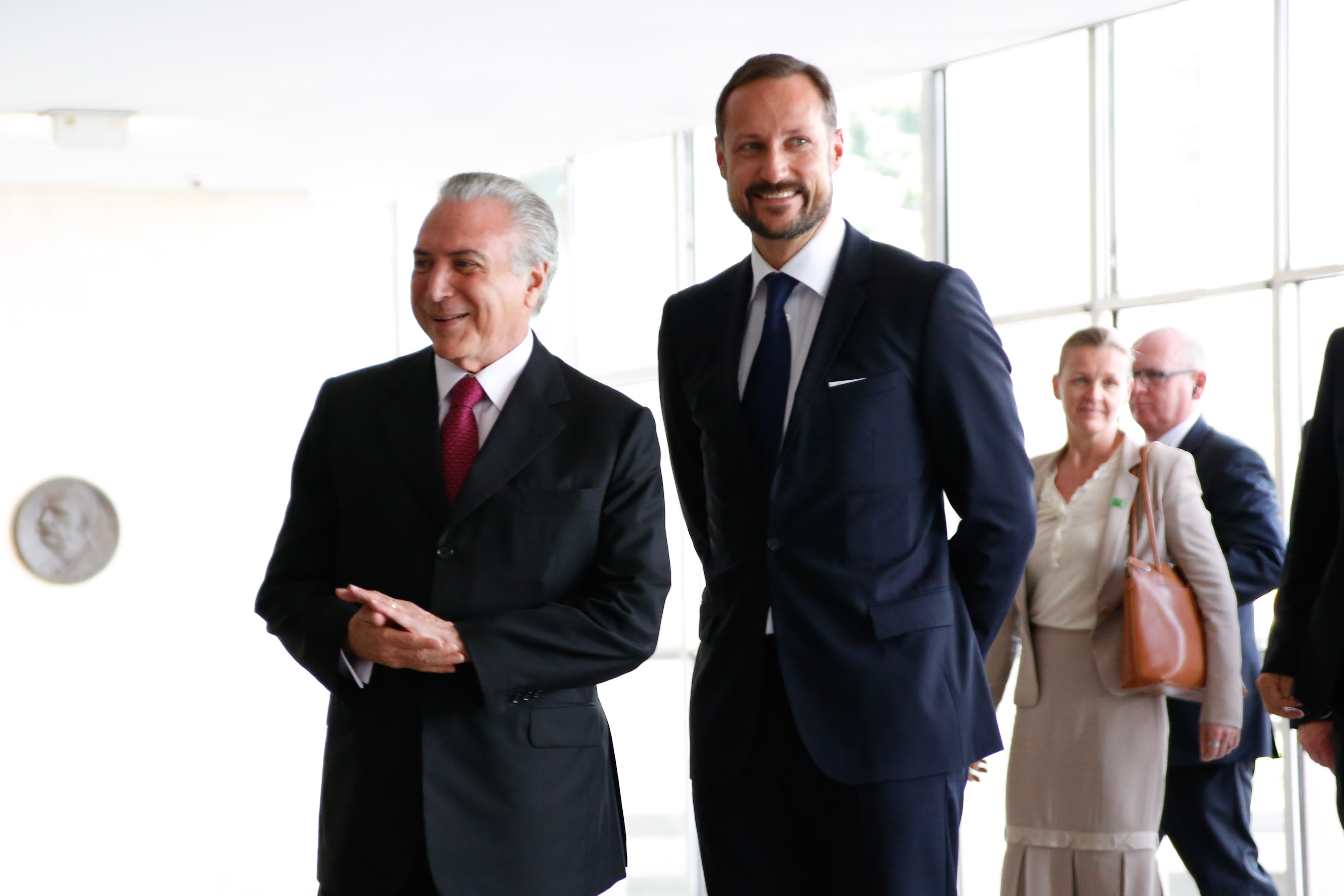 16-11-2015 Presidente em exercício, Michel Temer, recebe no Itamaraty o príncipe herdeiro da Noruega, Haakon Magnus, com objetivo de ampliar relações econômicas entre os dois países. Foto: Anderson Riedel